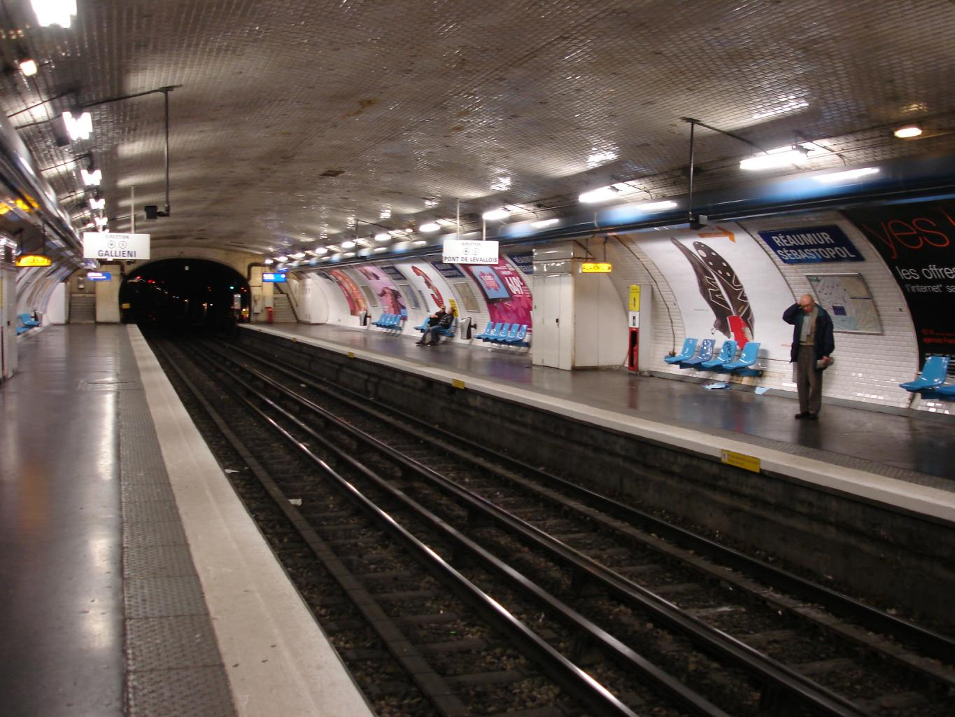 Métro de Paris - ligne 3 - Station Réaumur - Sébastopol (France)